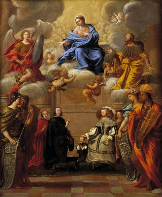 La obra muestra la Apoteosis de la Virgen María, madre de Jesucristo, y a sus pies aparecen el rey Felipe IV de España y Mariana de Austria junto al futuro Carlos II, rodeados por el cardenal Pascual de Aragón, una dama de la Reina y las cuatro partes del mundo.